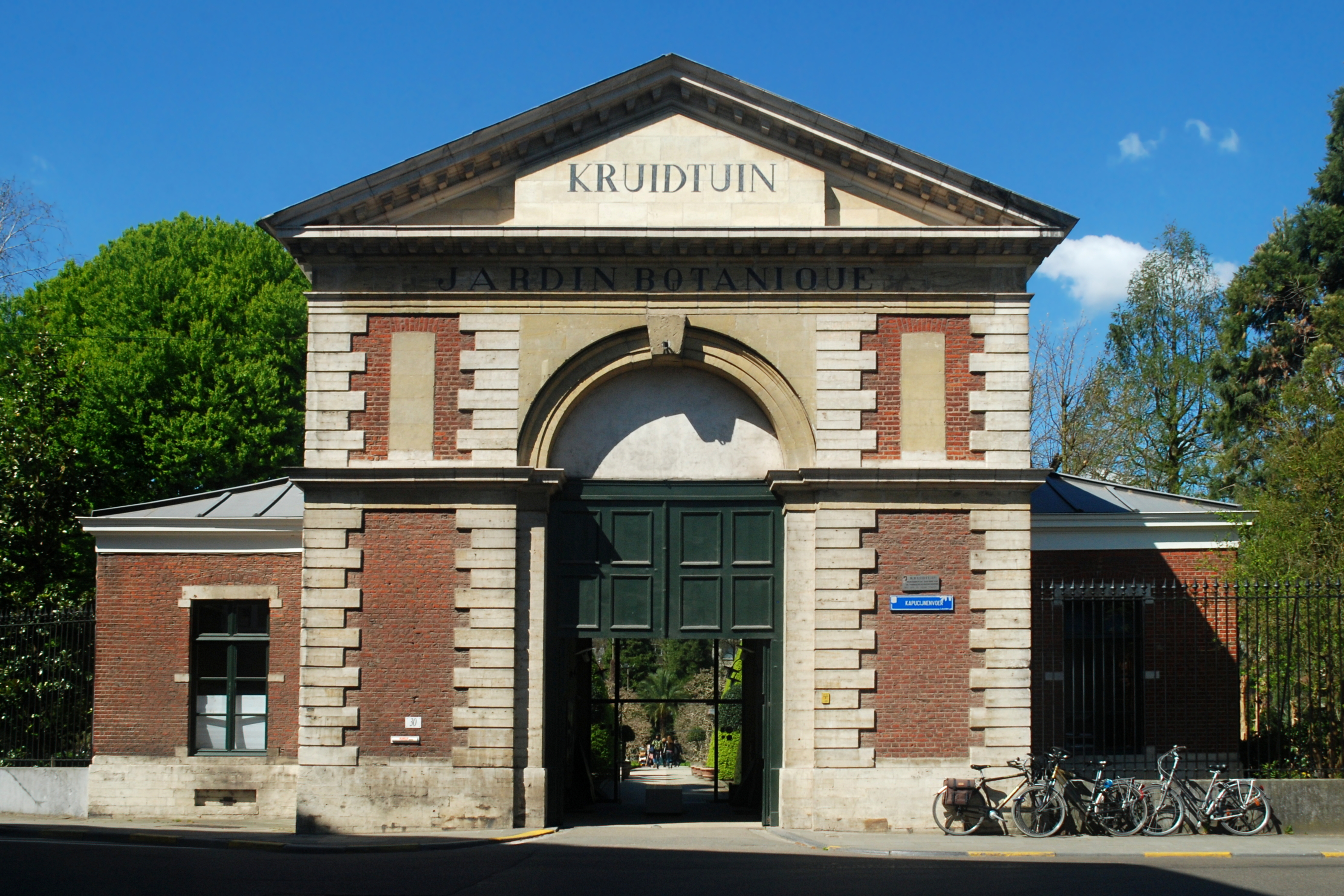 Belgique - Louvain - Jardin botanique (Kruidtuin) - portail néo-classique (architecte Charles Vander Straeten)